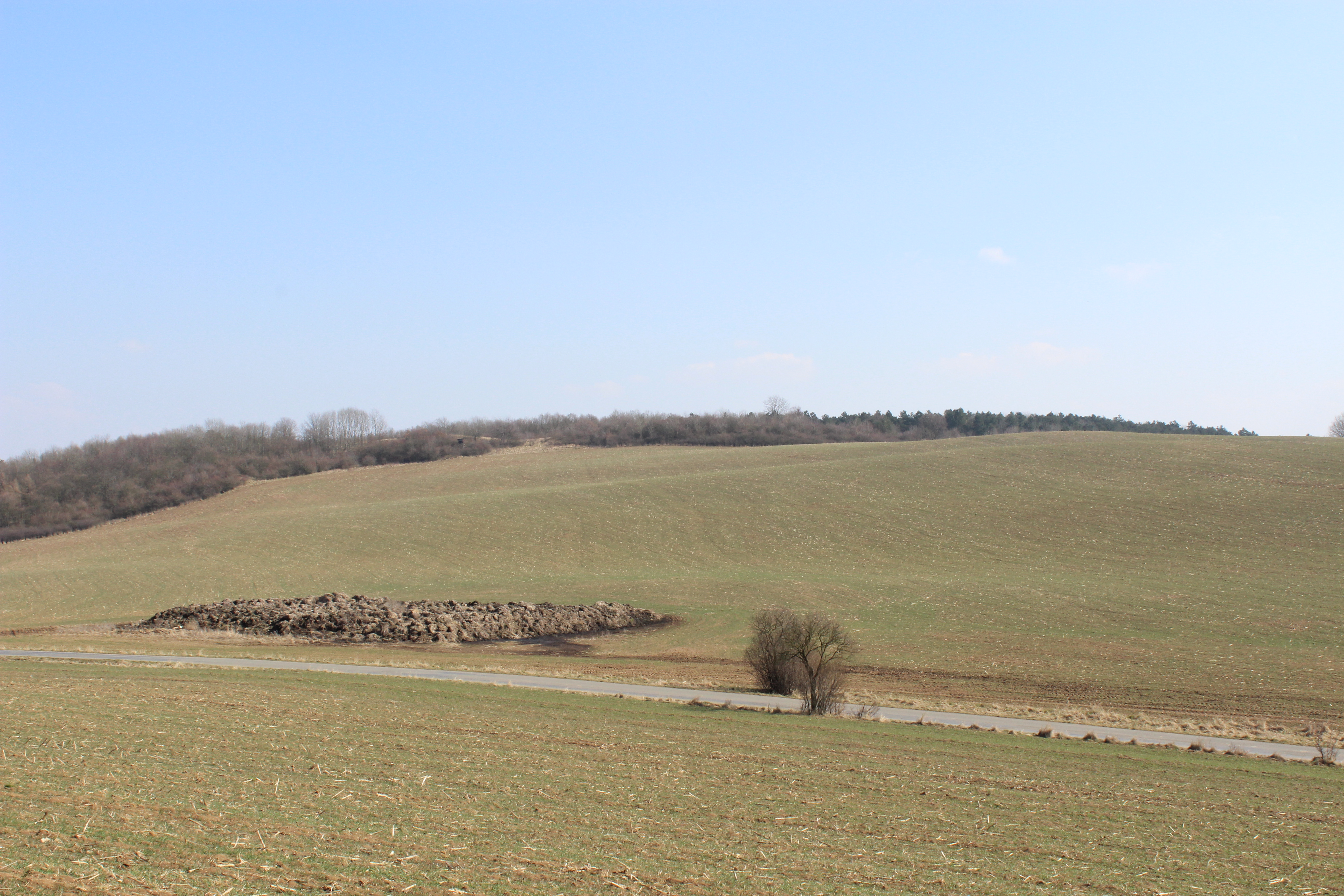 Před Bacínem u silnice, Šamor na VJV